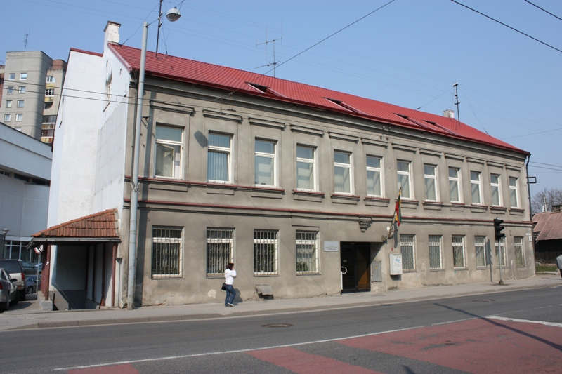 Vilniaus rajono apylinkės teismo pastatas Vilniuje.